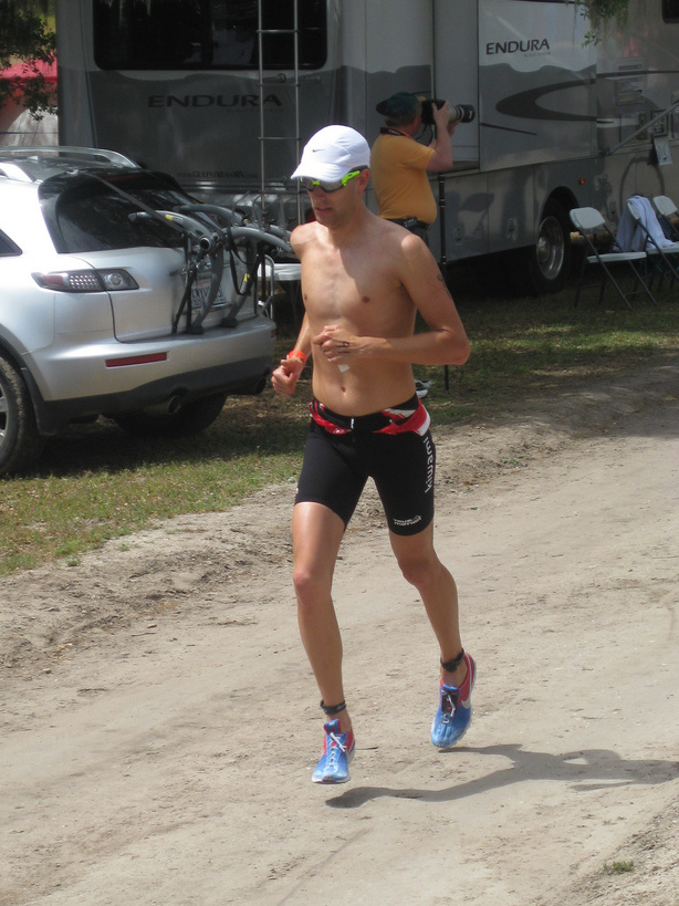 Windflower 2009